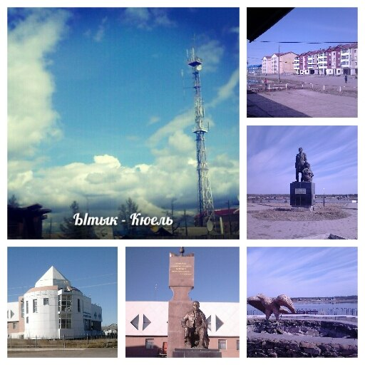 Ытык-Кюель.Фотографии